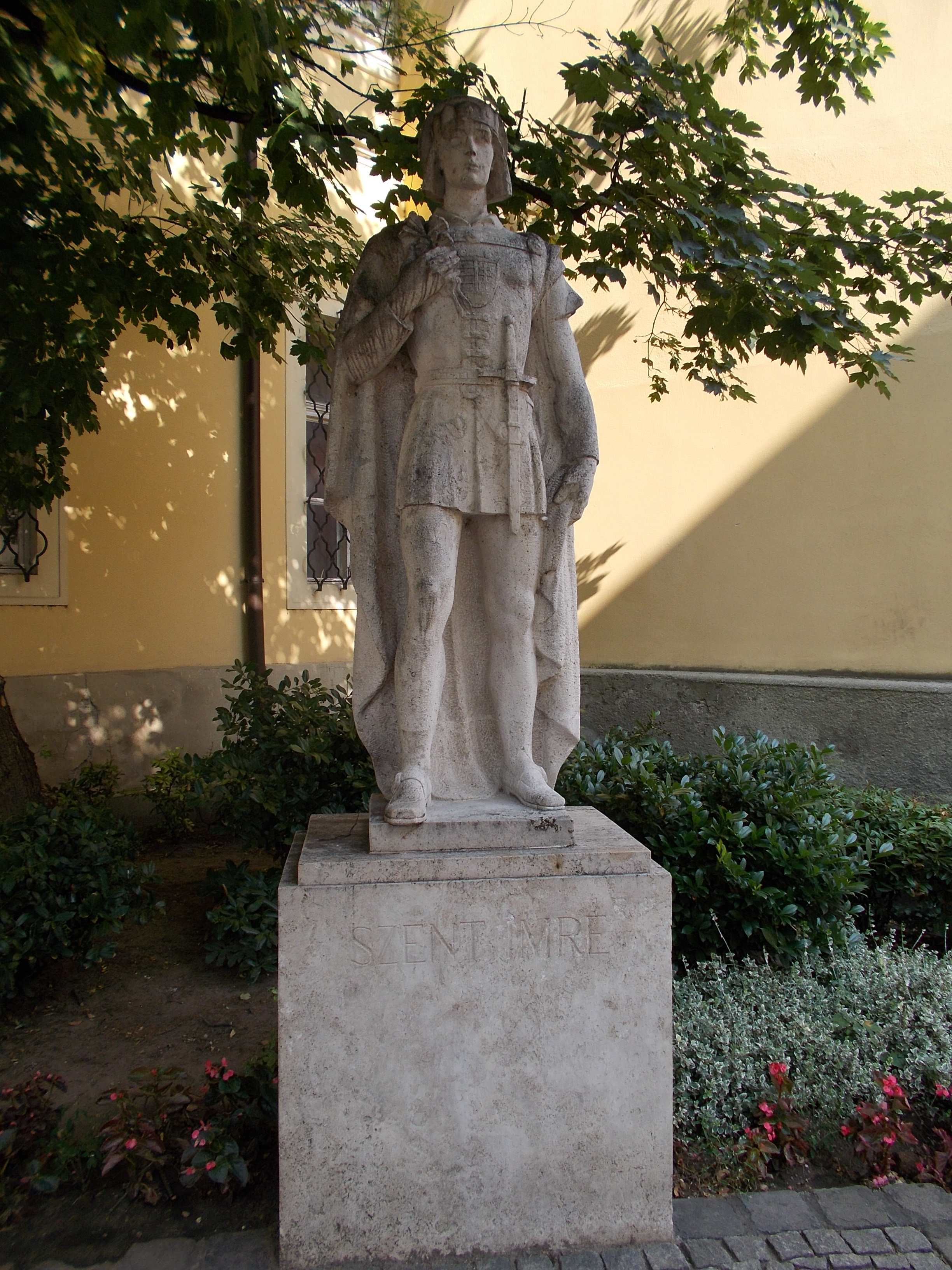 Szent Imre templom Műemlék ID 3913. (Lux Elek, felállítás éve 1991.; eredetileg: 1935) A torony előtti kisebb téren, az Oskola utcában Szent Imre kőszobra (mészkő) áll. - Magyarország, Fejér megye, Székesfehérvár, Belváros, Városház tér This is a photo of a monument in Hungary, Identifier: 3913